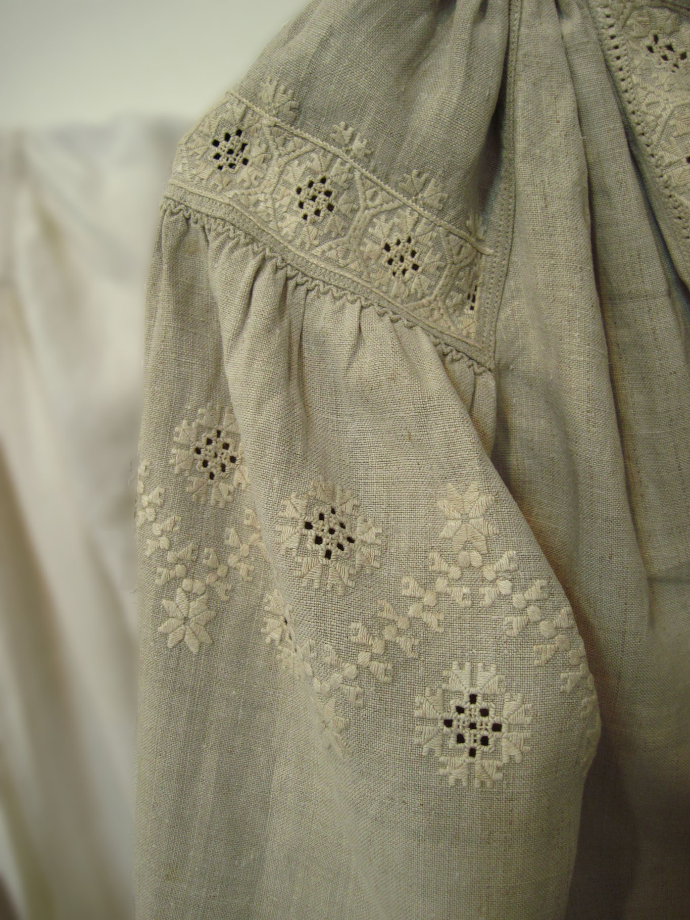 Жіноча сорочка з с. Суємці Баранівського району Житомирської області, поч. ХХ ст. Колекція Музею Івана Гончара, Київ (КН-19111). Сфотографовано на виставці "Українська вишиванка: традиції, стиль, свобода!"